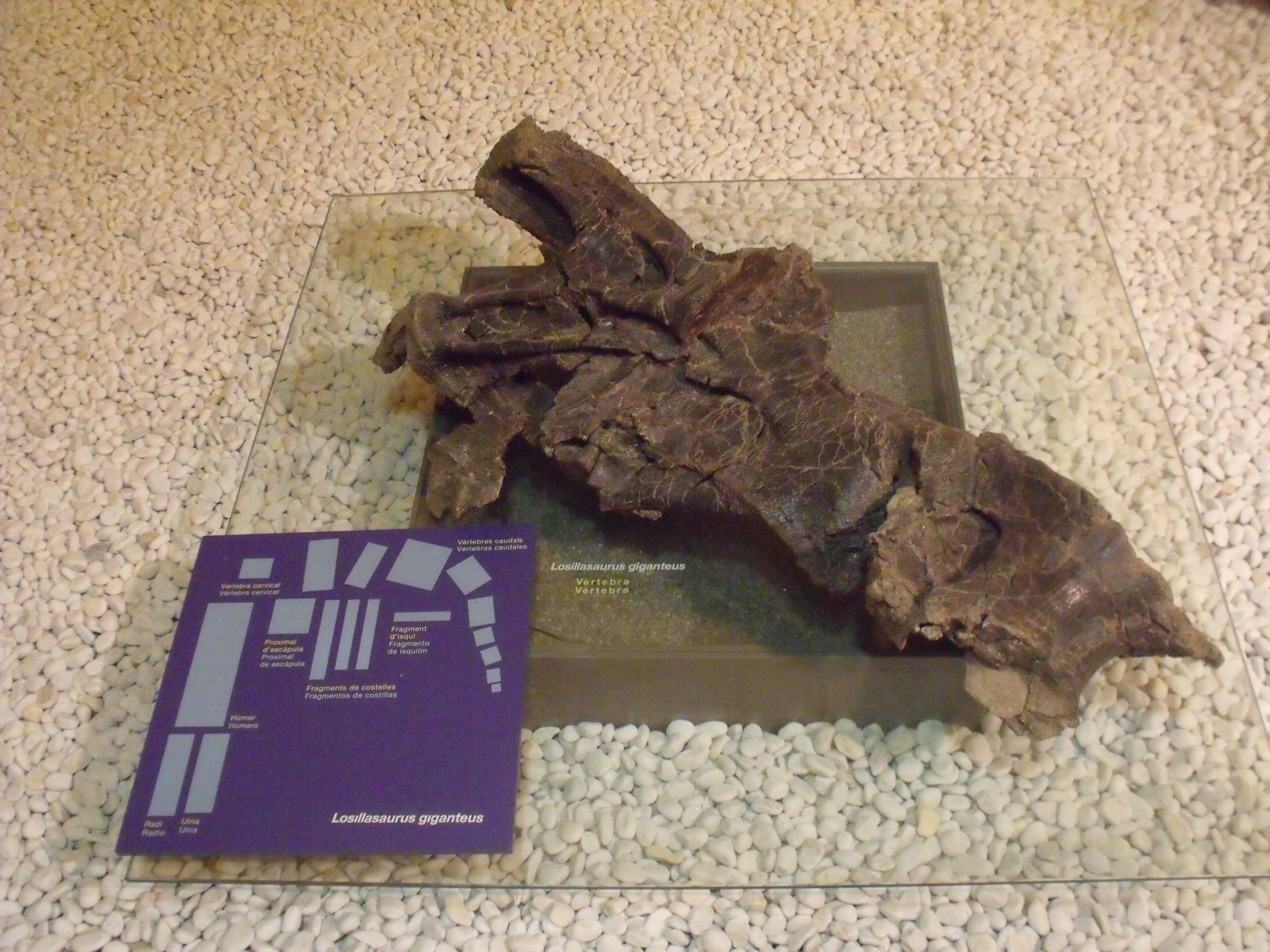 Vértebra de Losillasaurus giganteus